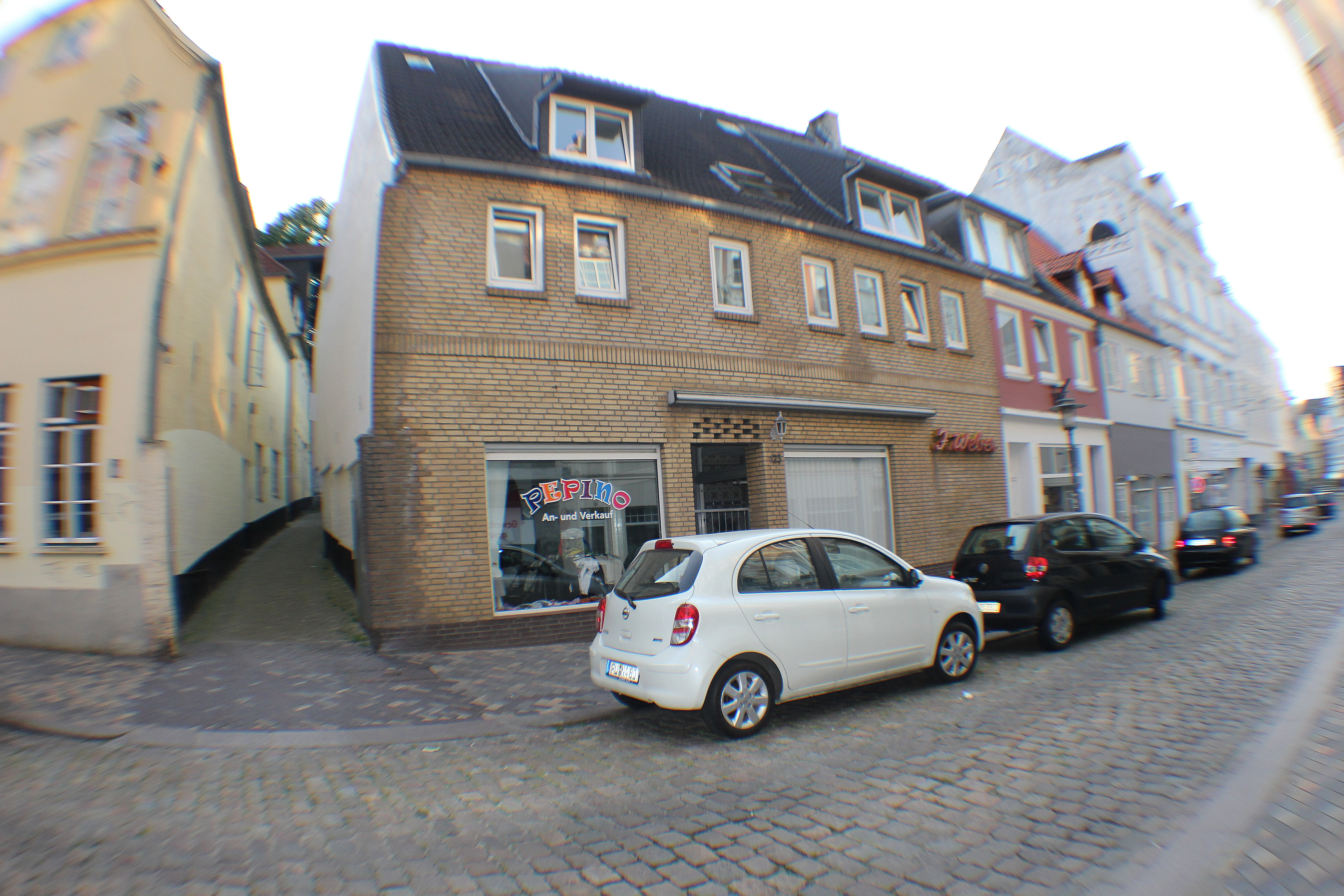 wo St. Gertrud mit Kirchhof einst zu sehen war; St. Petrikirche und die heutige St. Gertrud-Kirche berufen sich jeweils auf diesen Vorgängerbau.